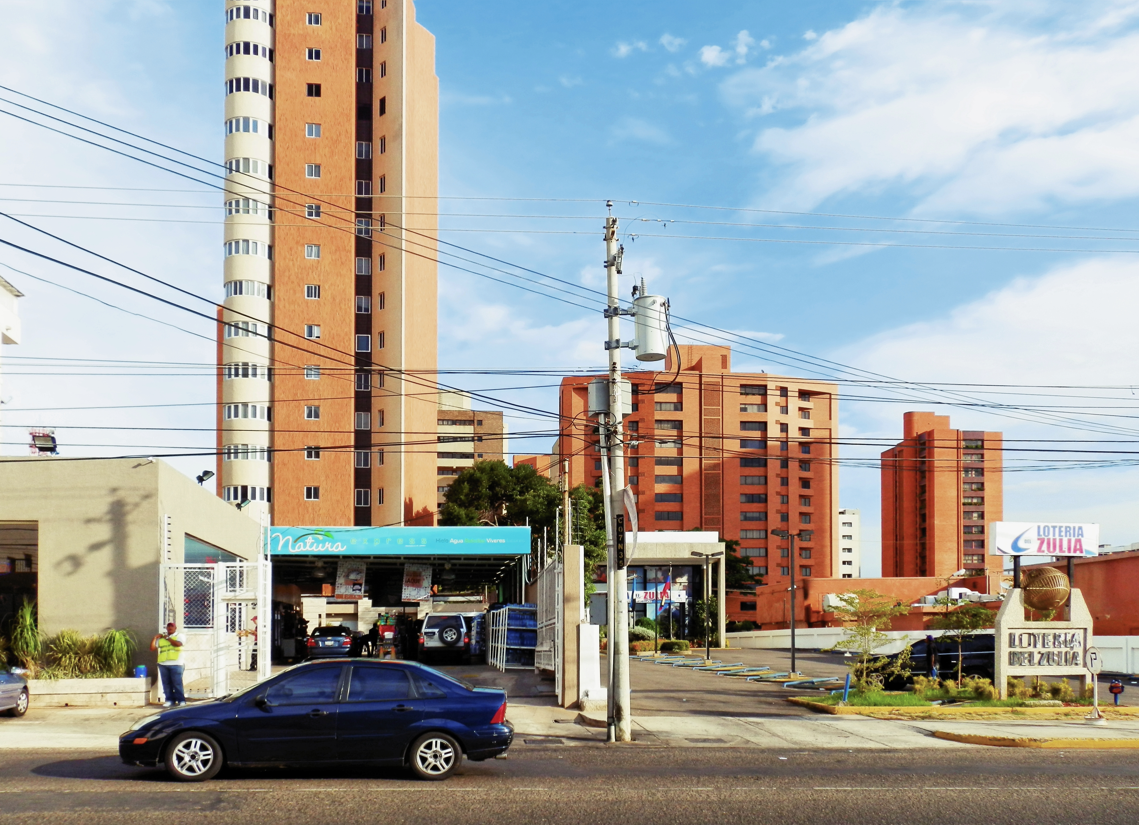 Lotería del Zulia, Maracaibo, Venezuela